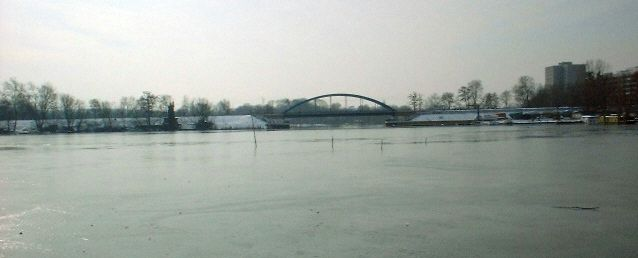 Neustädter Havelbucht als Teil des Templiner Sees in Potsdam, Blick nach Süden auf Untere Planitz und Küssel